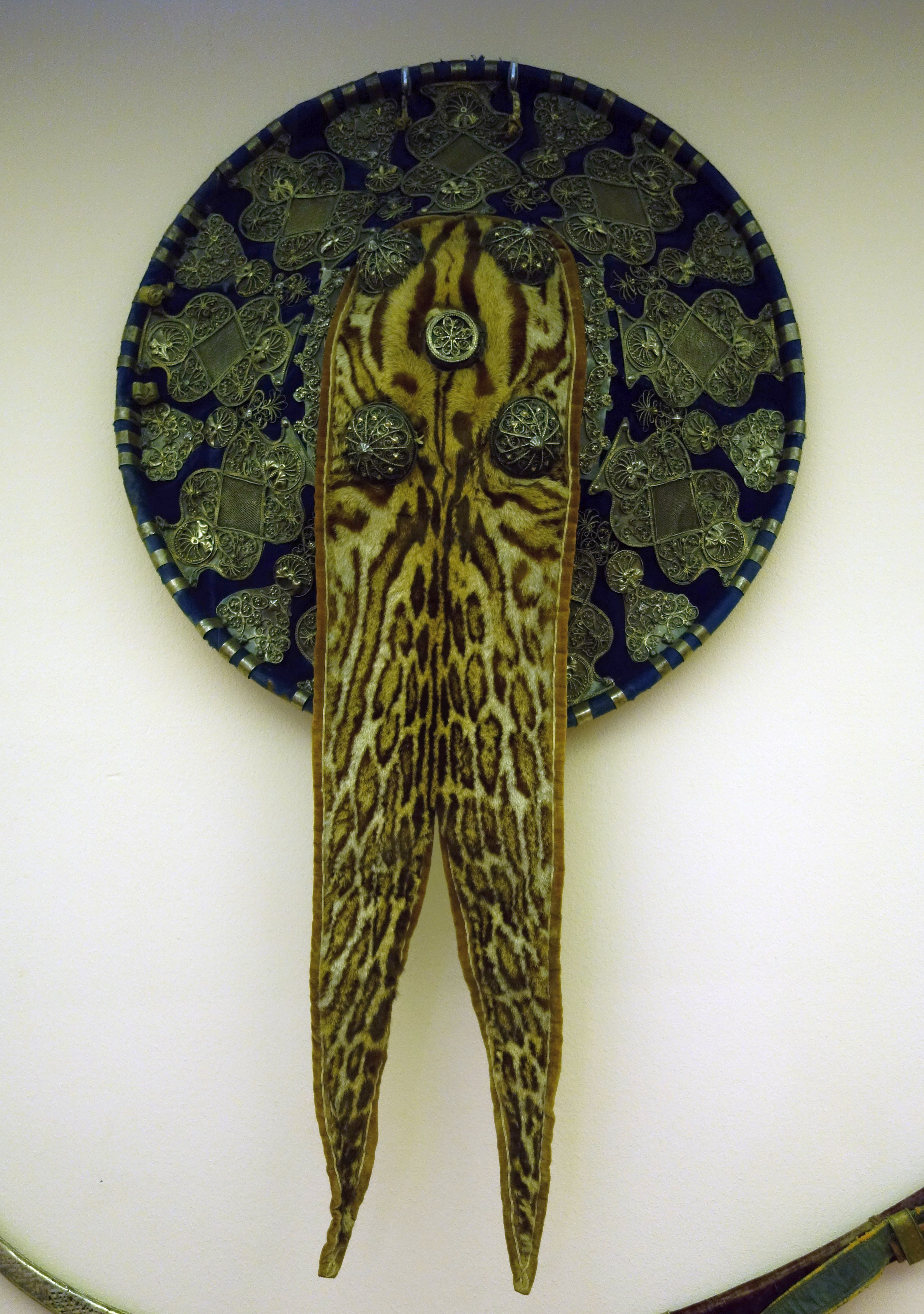 Stuttgart, Linden-Museum, Afrika-Abteilung. Prunkschild für einen hohen Würdenträger, der auch erfolgreicher Jäger war. Tierhaut, Samt, Silber, Servalfell [Museumsangabe, der Fellzeichnung nach jedoch Peludofell oder ein kleines Ozelotfell, beides Südamerika. Ein Phantasieprodukt oder eine nachträgliche Veränderung durch einen kreativen Händler?]. Amhara 19. Jahrhundert. Inv. Nr. 55.343.